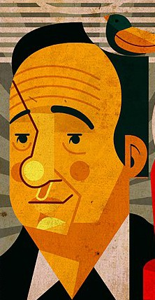 Imagen minimalista del actor Chespirito